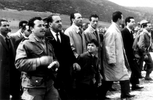 Une photo rare des chefs F.L.N./A.L.N. en 1962 (Ferhat Abbas, Mohamed Boudiaf, Rabah Bitat, Ahmed Ben Bella et Houcine Aït Ahmed) aux frontières Algero-Marocaine, une photo prise par Khaled SAFER.